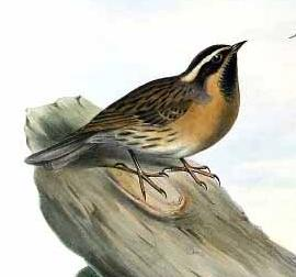 Accenteur à gorge noire